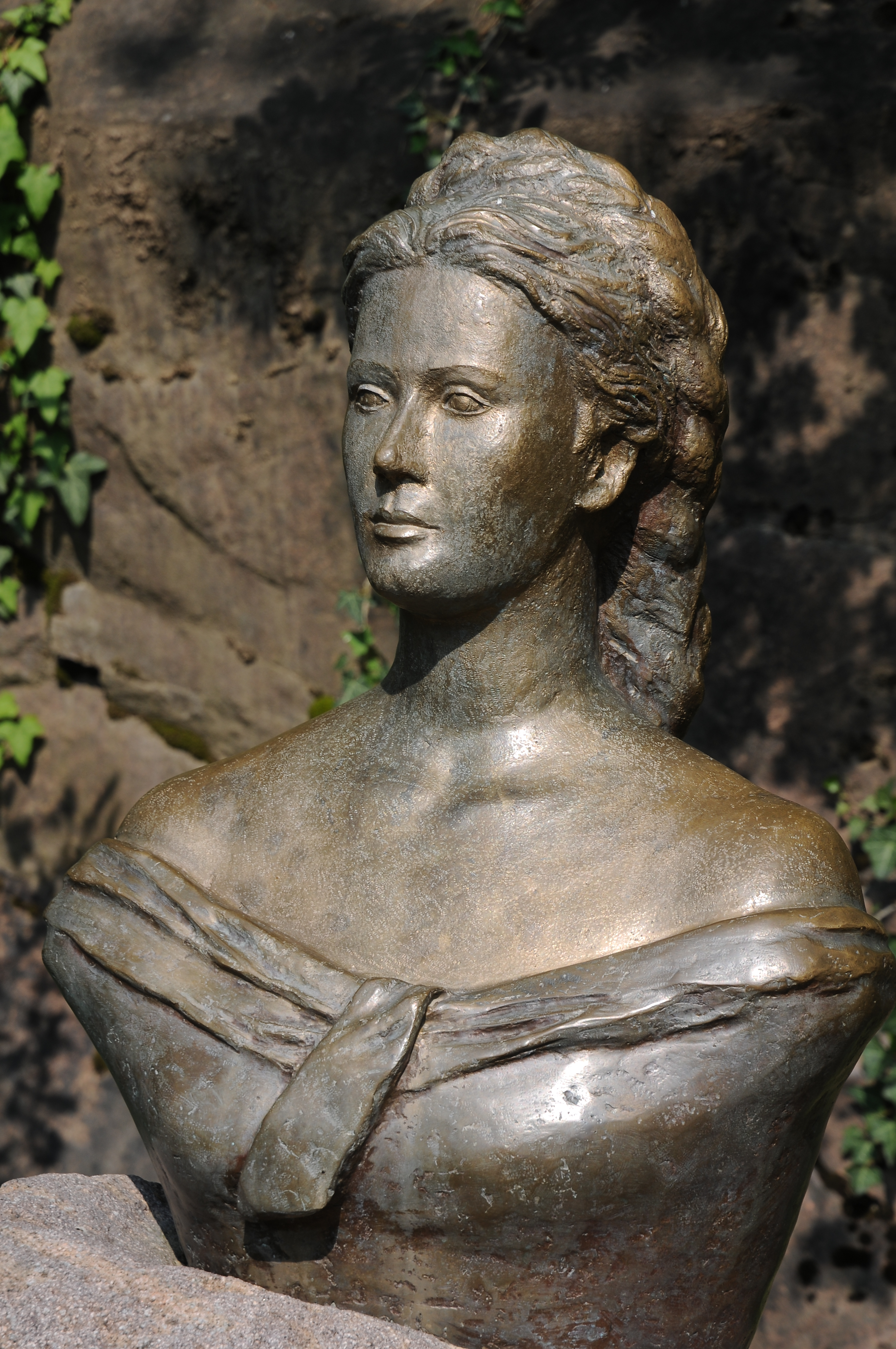 Die Gärten von Schloss Trauttmansdorff liegen am östlichen Stadtrand von Meran in Südtiro /Italien. Der nach seinem Wahrzeichen – Schloss Trauttmansdorff – benannte botanische Garten der Kurstadt Meran nimmt eine Fläche von rund zwölf Hektar ein.